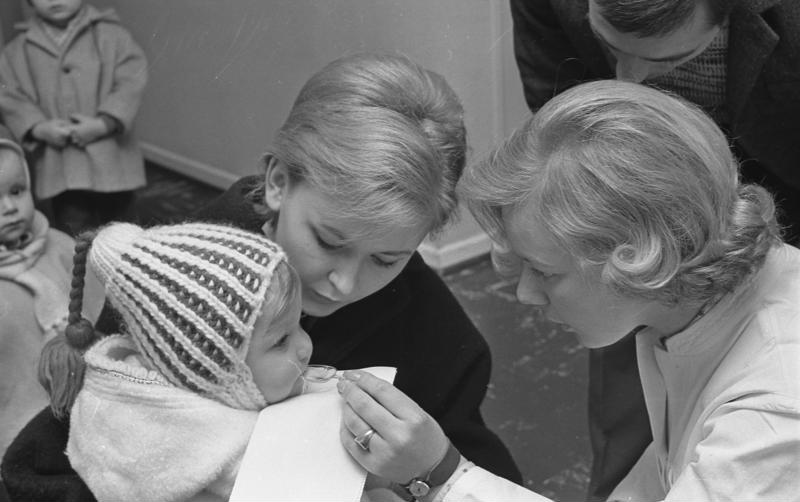 Polio-Schutzimpfung im Gesundheitsamt Bonn